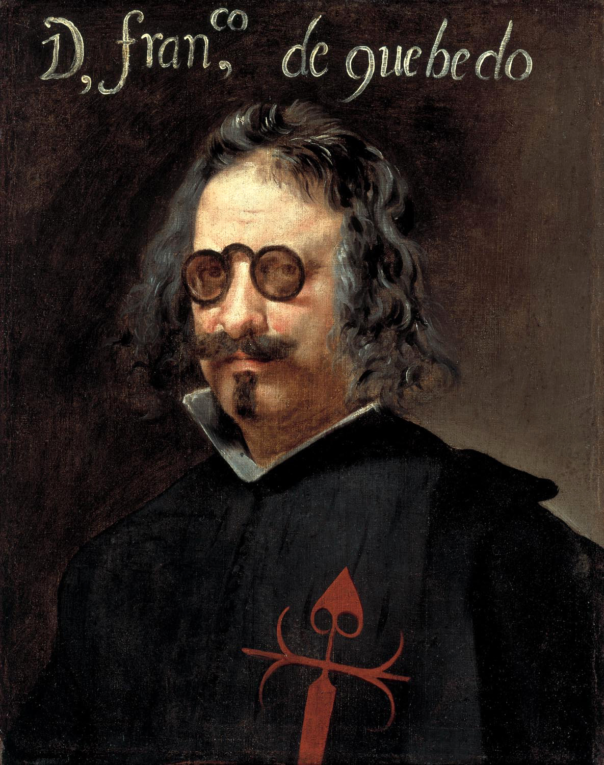 Retrato del célebre poeta y escritor español Francisco de Quevedo y Villegas (1580-1645), que fue señor de la Torre de Juan Abad, caballero de la Orden de Santiago y el máximo exponente del Conceptismo en España, siendo además enemigo acérrimo del insigne poeta cordobés Luis de Góngora y Argote, que era el máximo representante del Culteranismo. Este célebre lienzo, conservado en el Instituto Valencia de Don Juan, ha sido con frecuencia atribuido a Diego Velázquez, aunque en realidad solo es una de las tres copias del original perdido que pinto el célebre pintor hispalense y que fueron ejecutadas en su taller. Y el que se conserva en el Instituto Valencia de Don Juan perteneció desde el siglo XVII a los condes de Oñate, aunque en 1880 fue vendido a los condes de Valencia de Don Juan. Sin embargo, hay otras dos versiones de ella, hallándose una en Apsley House, Londres, y la otra en Madrid y en la colección de la familia de Xabier de Salas. Las dos primeras incluyen la inscripción alusiva al nombre del retratado, mientras que la última no, pero sí una «J» en el campo de la derecha, que es el resto de la firma del autor, que según los últimos estudios podría haber sido el pintor Juan van der Hamen.